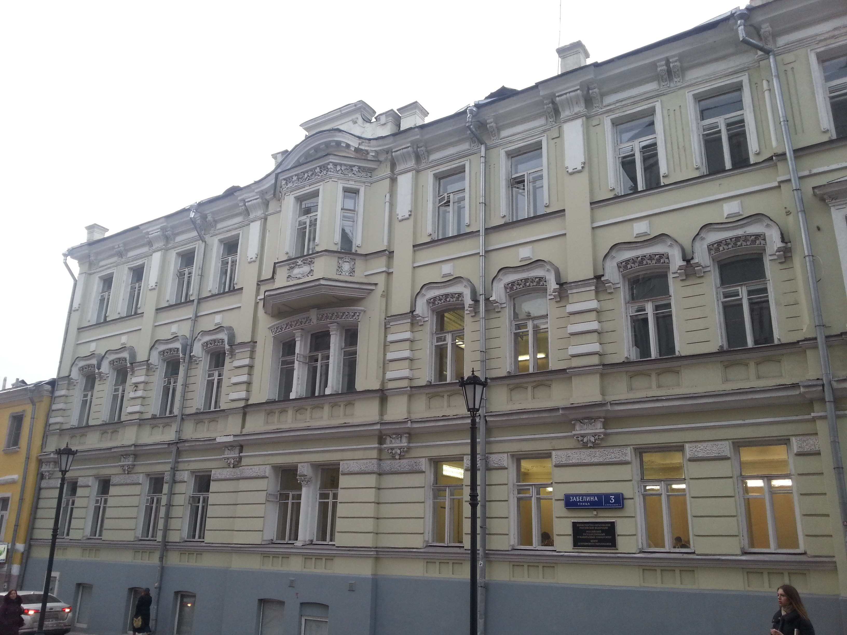 Здание центра довузовской подготовки РГГУ. Улица Забелина, дом 3. 1 ноября 2015г.